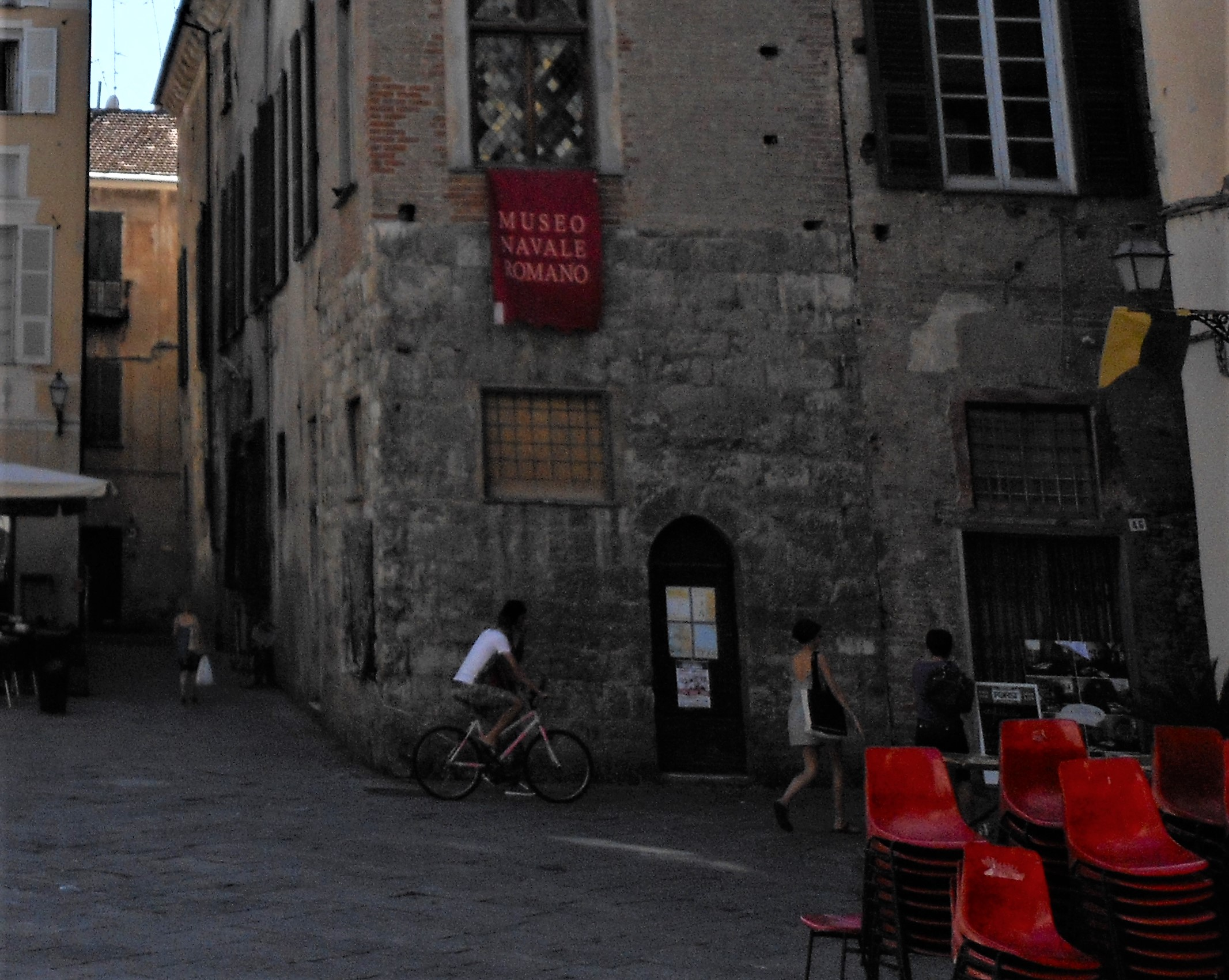 la base in pietre, foto scattata nel 2016